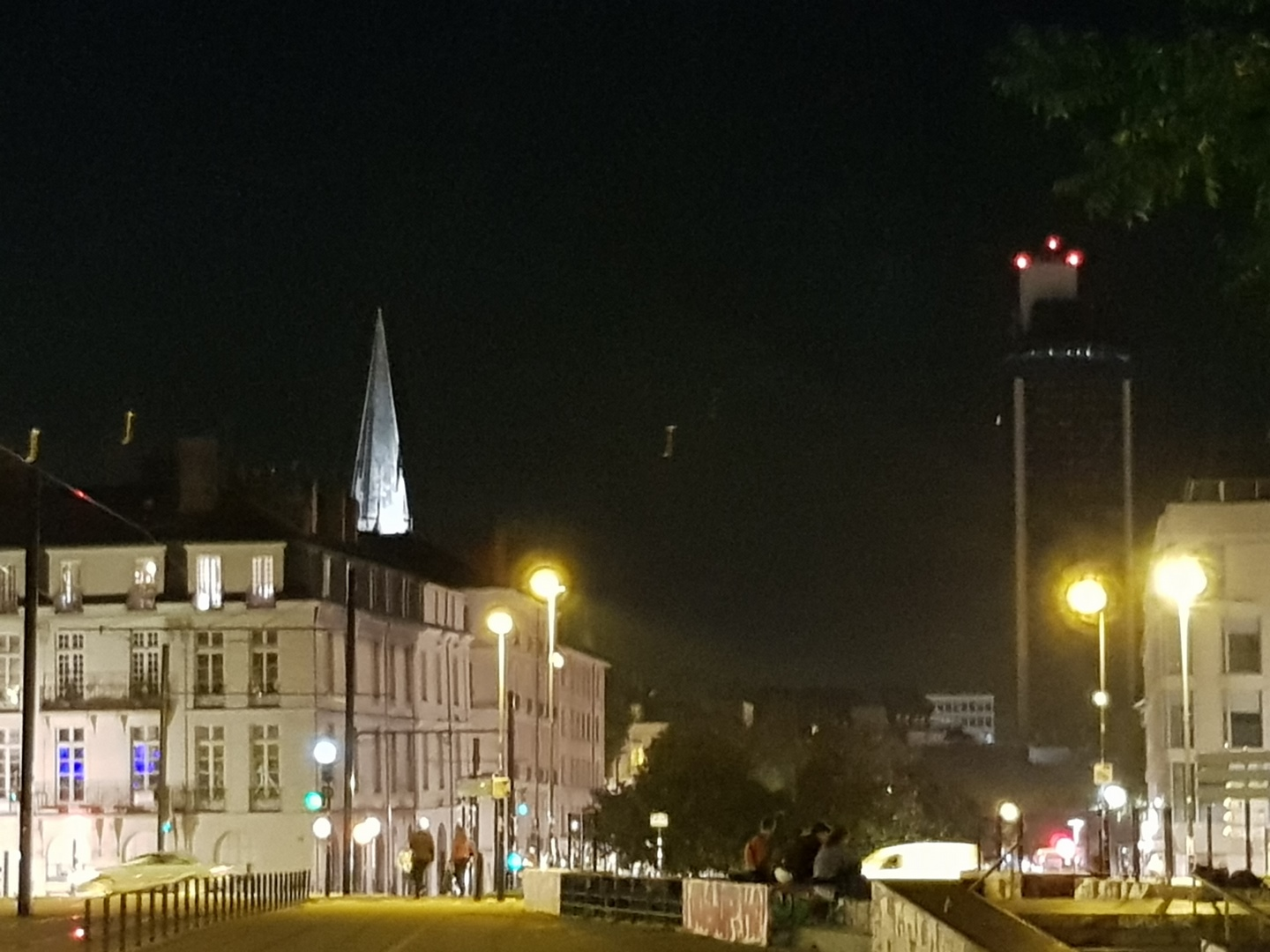 Le cours Olivier de Clisson à Nantes de nuit pris de la place Alexis Ricordeau